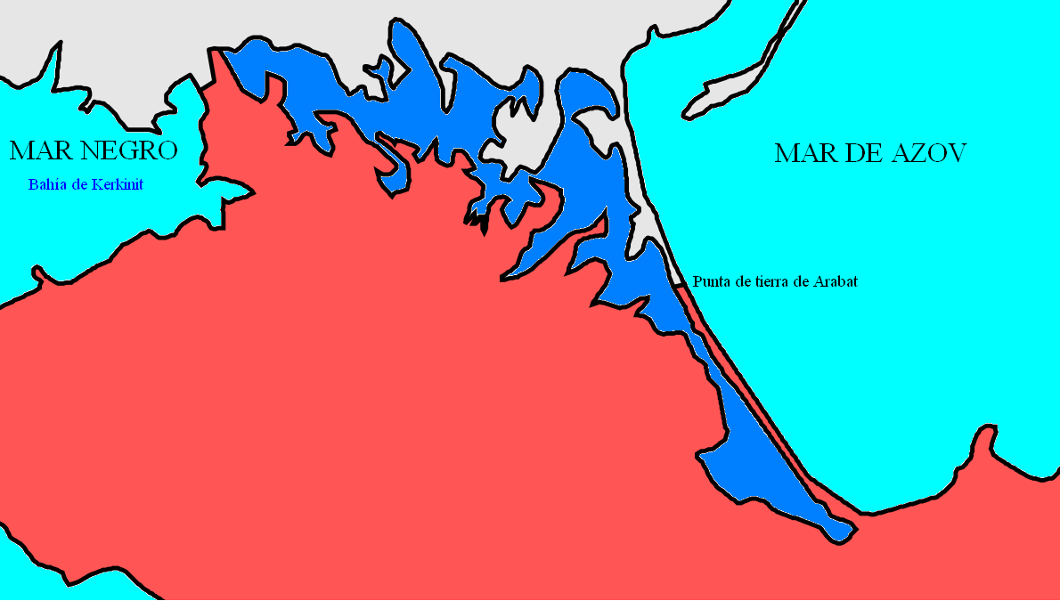 Mar de Sivash ("mar podrido").